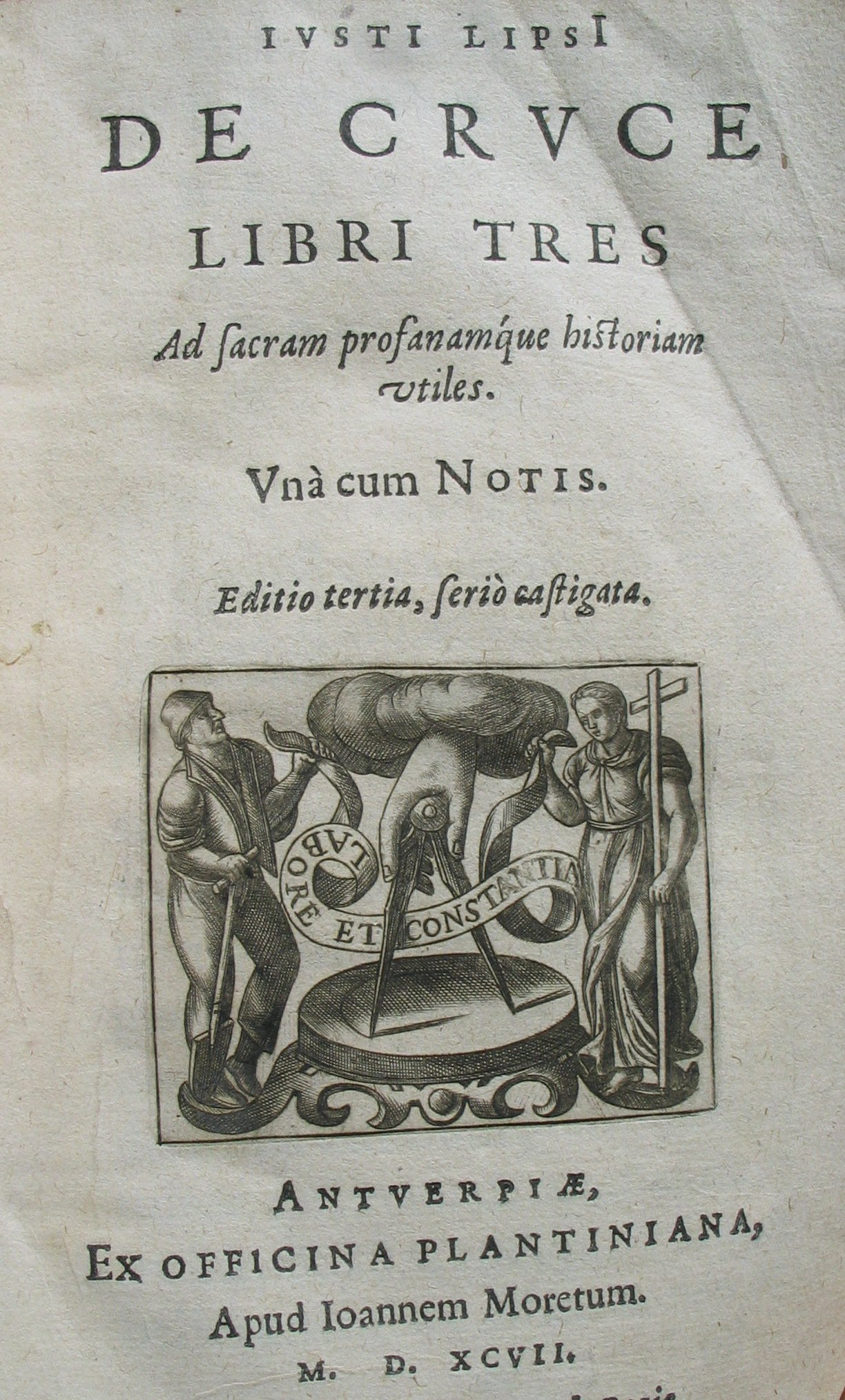 Frontispice du livre De Cruce (1593)